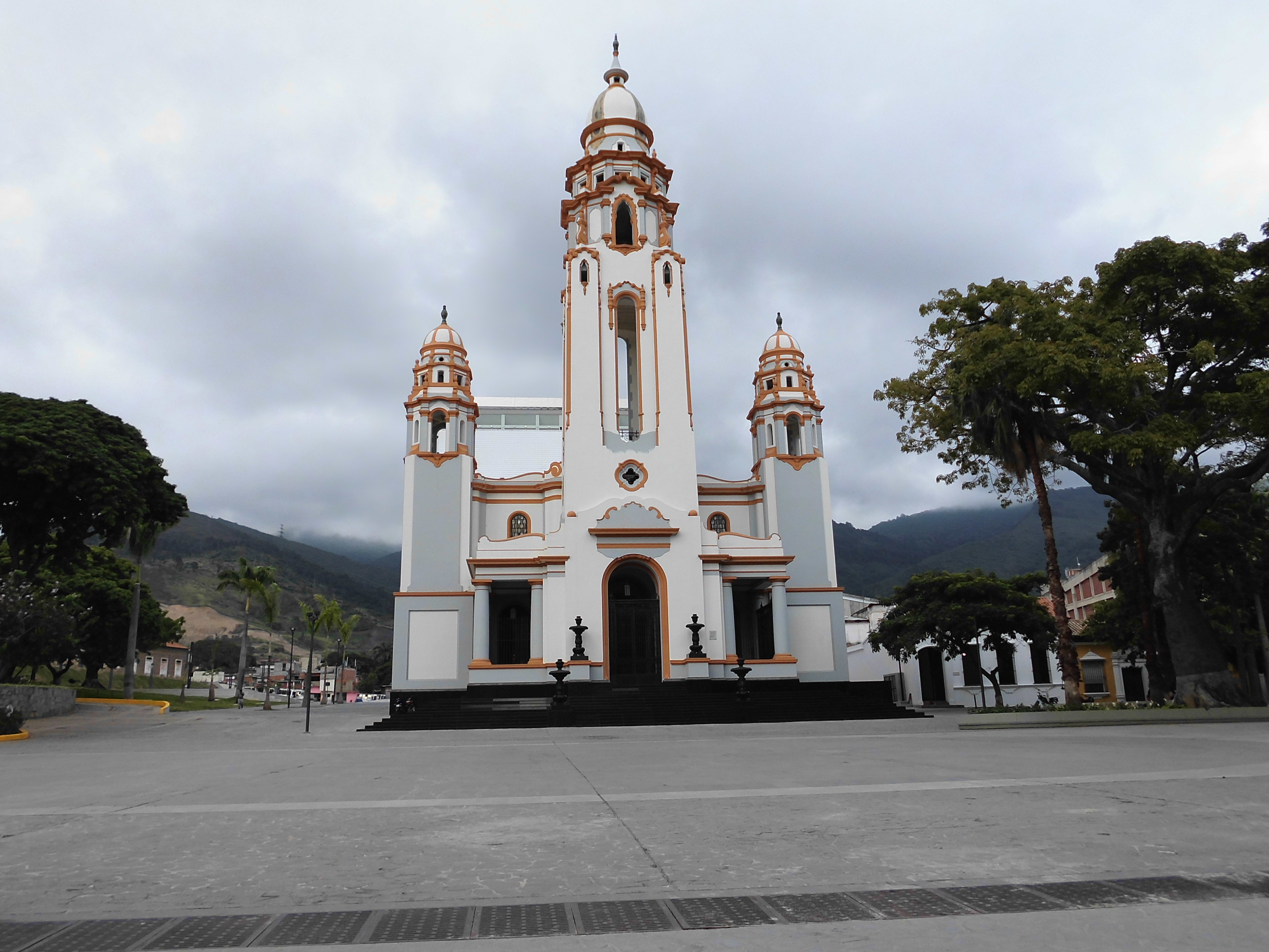 Panteón Nacional de Venezuela, es el edificio considerado como el más elevado altar de la Patria venezolana, donde se conservan los restos de personajes destacados de la historia de Venezuela